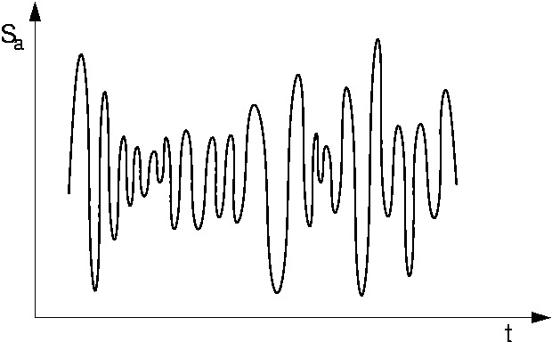 Zeitverlauf einer Schwingung